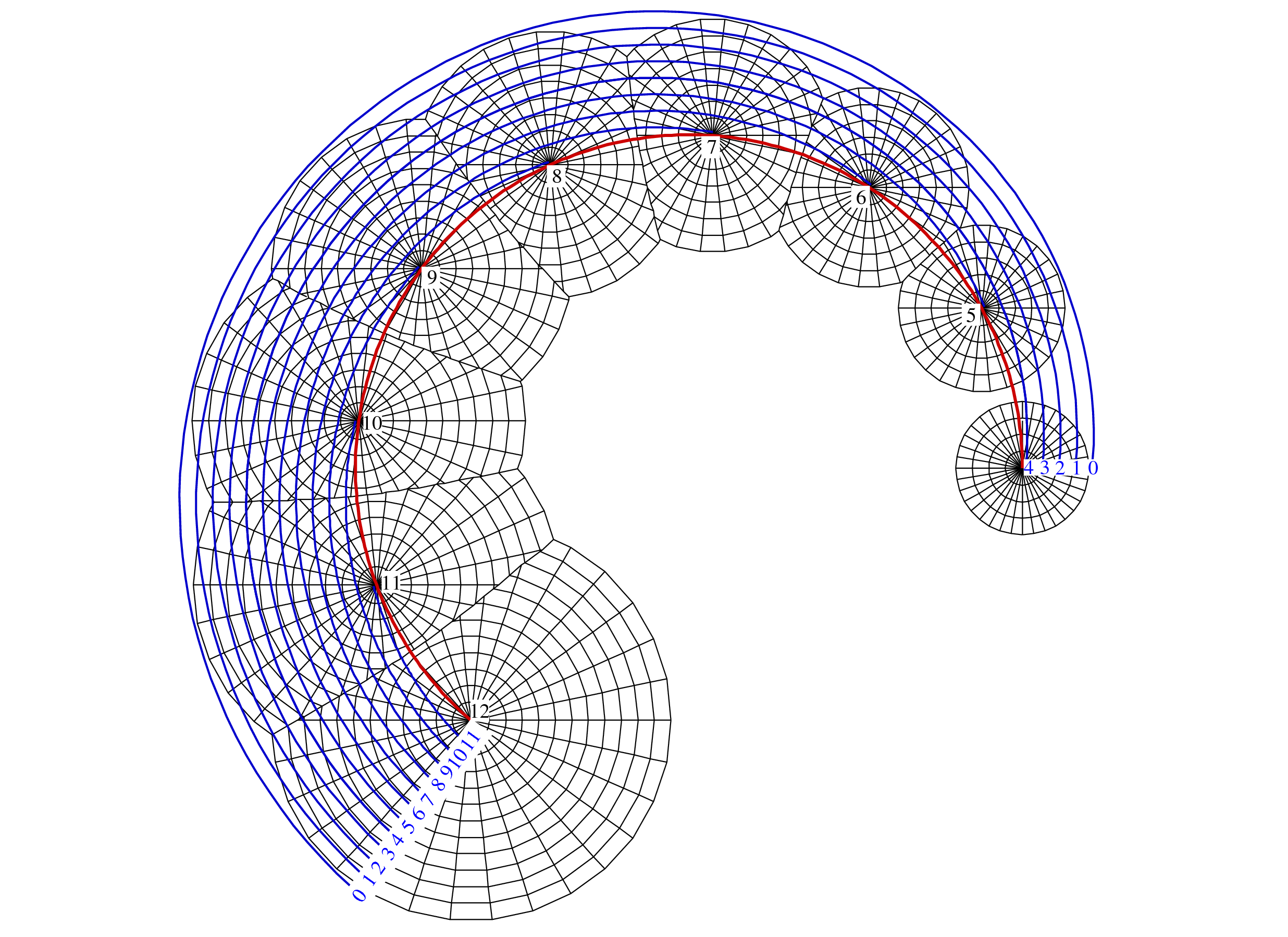 Böschungsfläche mit Höhenlinien in kotierter Projektion